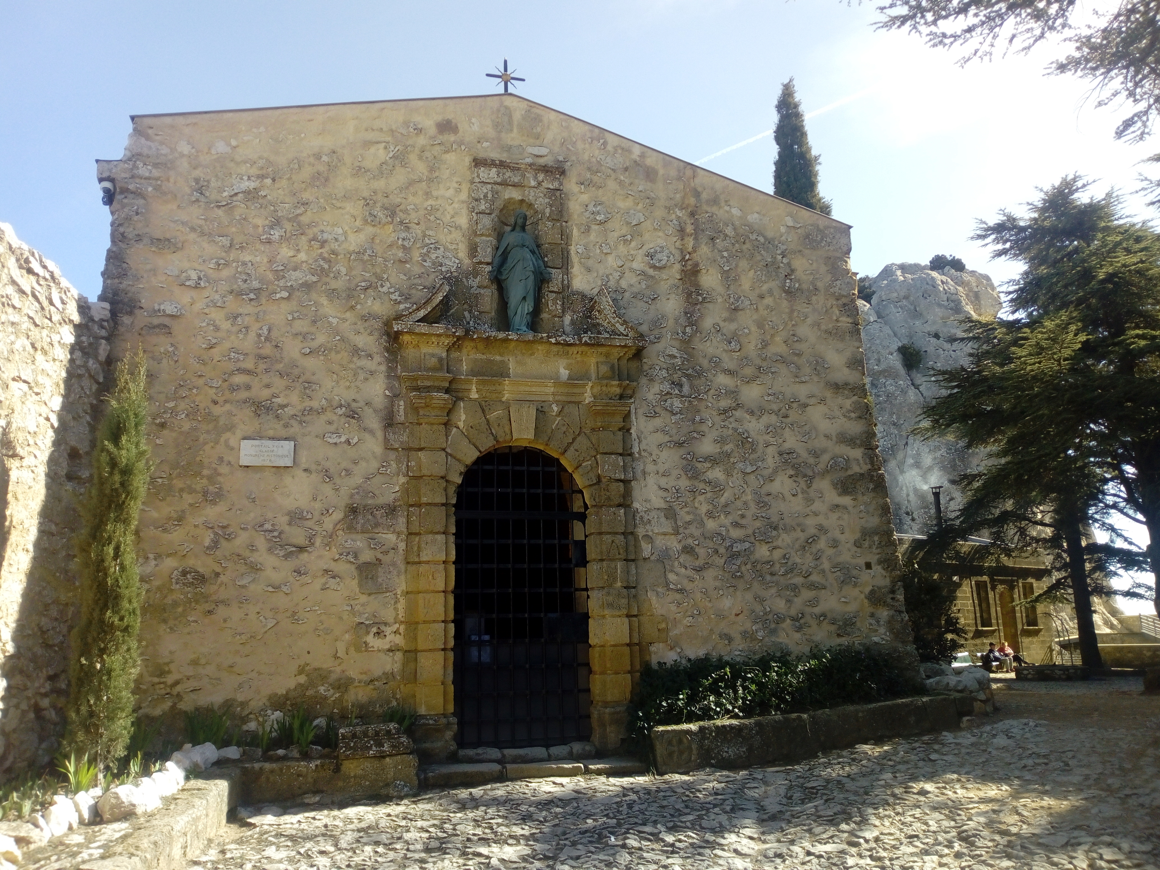 Prieuré de Sainte-Victoire en 2020.